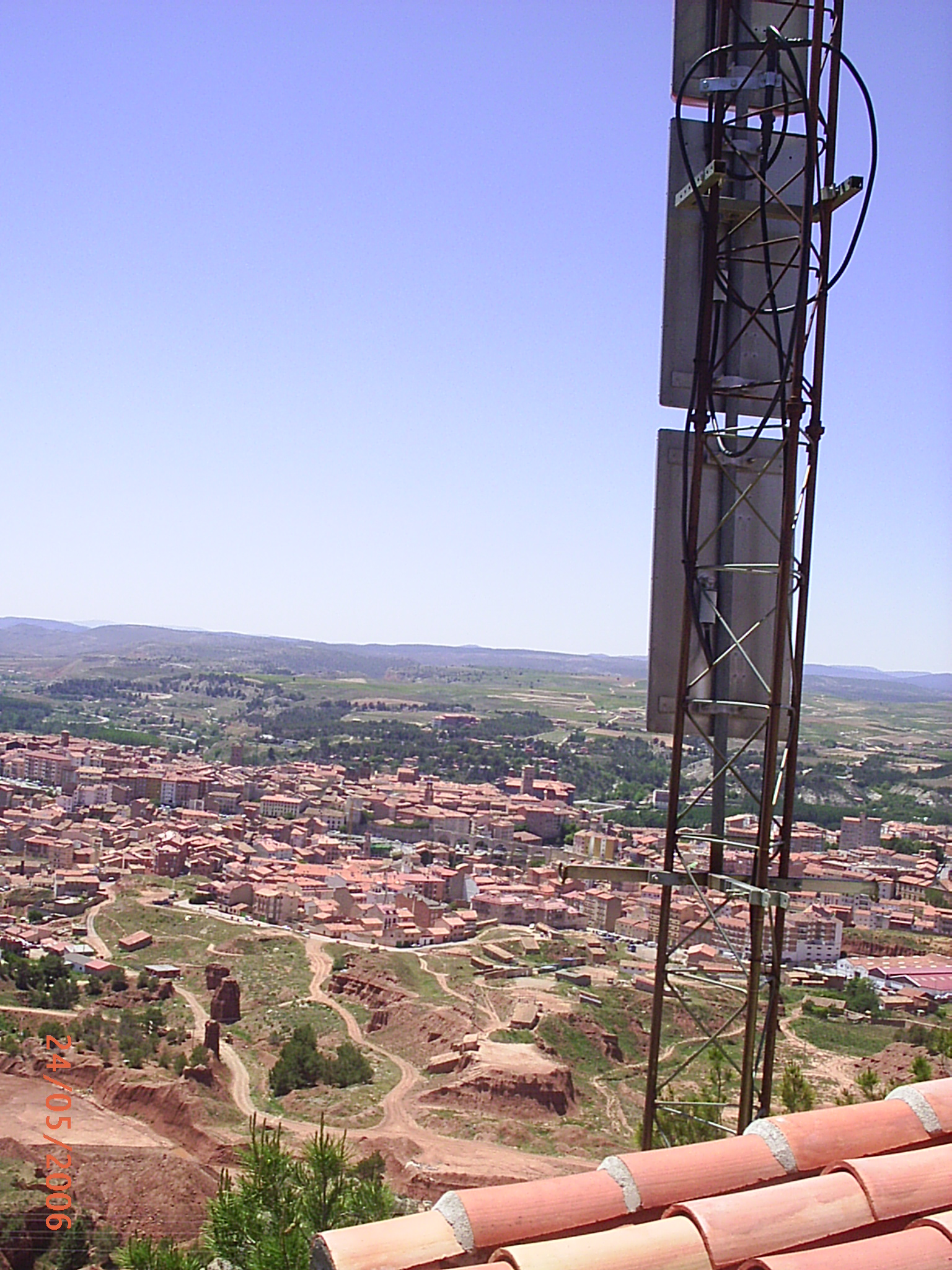 Teruel visto desde la antena de TV